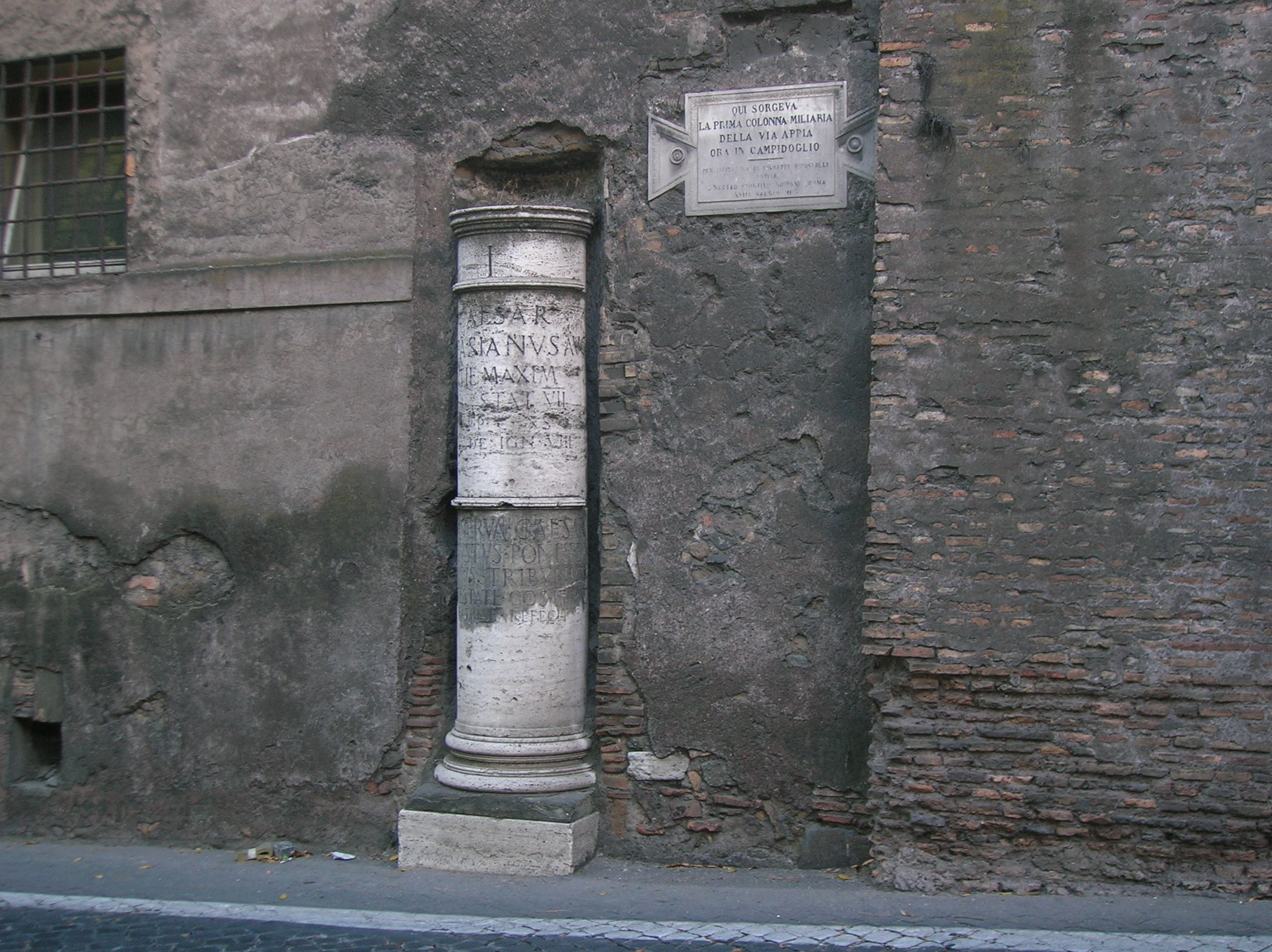 Prima pietra miliare dell'Appia antica (riproduzione, l'originale è al Campidoglio File:Campidoglio, Roma - Miliario I.jpg) CIL X 6812: I / Imp(erator) Caesar / Vespasianus Aug(ustus) / pontif(ex) maxim(us) / trib(unicia) potestat(e) VII / imp(erator) XVII p(ater) p(atriae) censor / co(n)s(ul) VII design(atus) VIII CIL X 6813:Imp (rador) Nerva César / Augusto Pontifex / tribunicia Maximus / co potestate (n) s (ul) Pat III (o) / refecit patriae